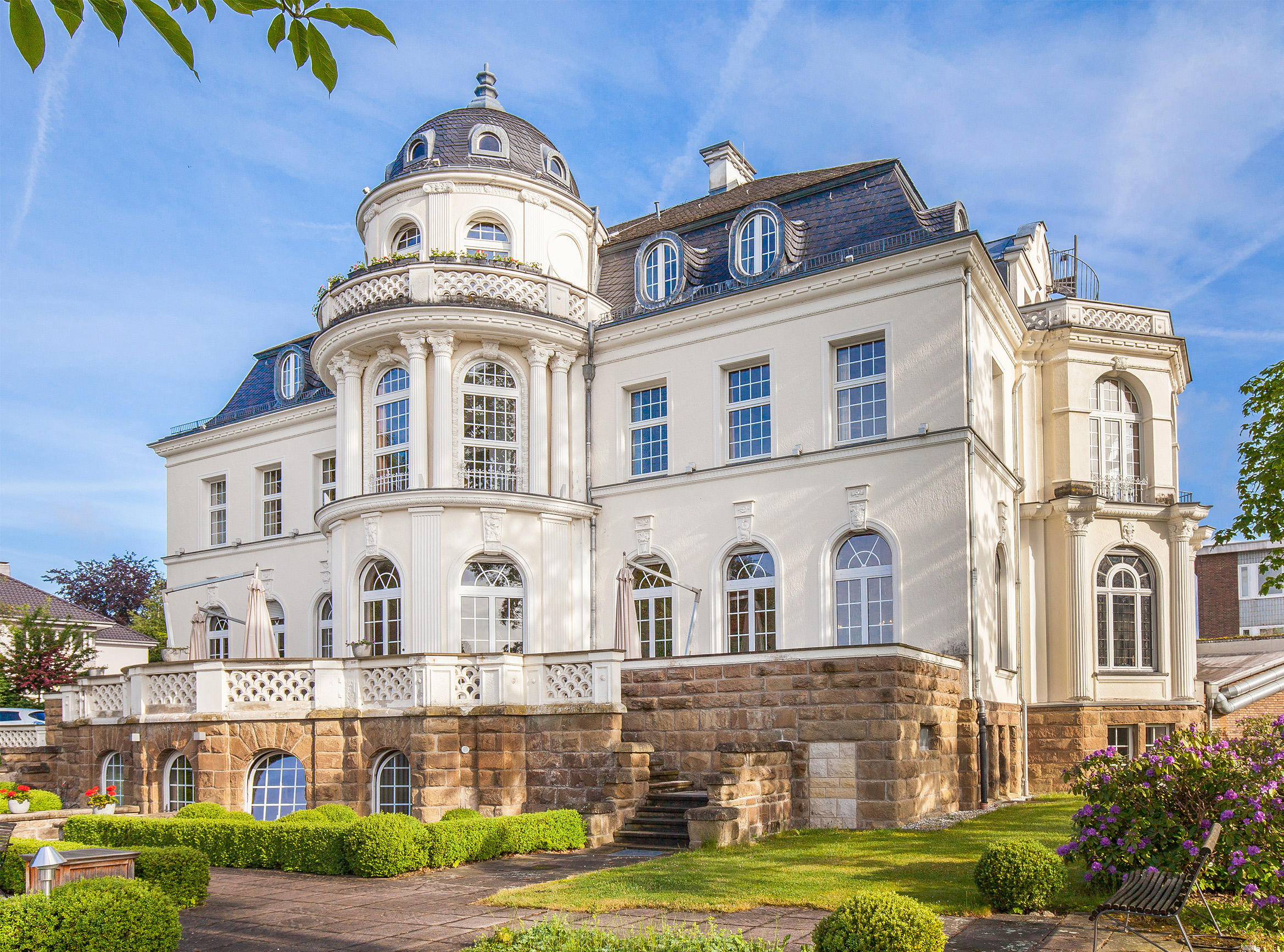 Villa Dürkopp in Bad Salzuflen, Kreis Lippe, Nordrhein-Westfalen. This is a photograph of an architectural monument.